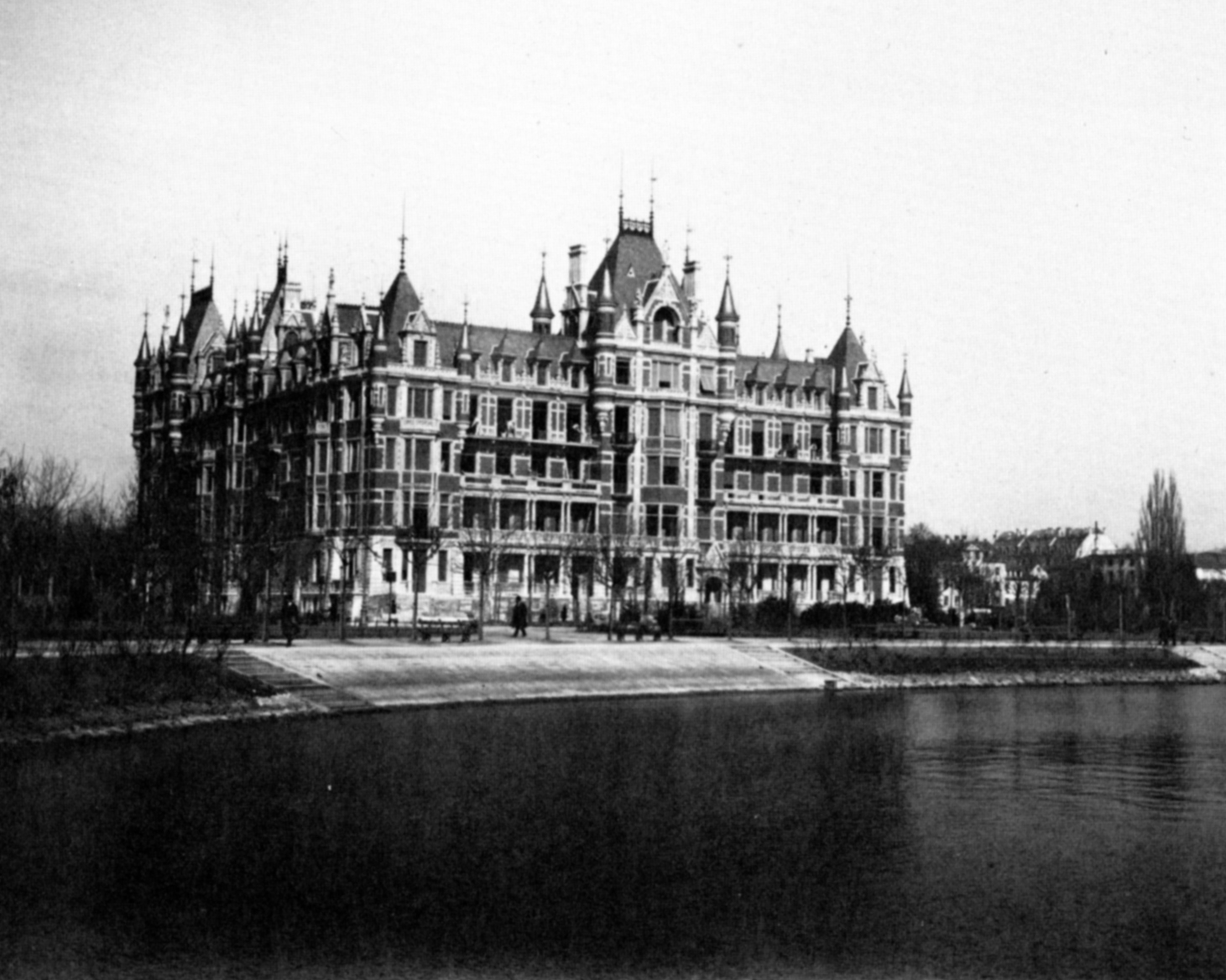 Das "Rote Schloss" in Zürich am Alpenquai (heute General-Guisan-Quai) um 1893. Nach Plänen von Architekt Heinrich Ernst 1891-1893 erbaut.